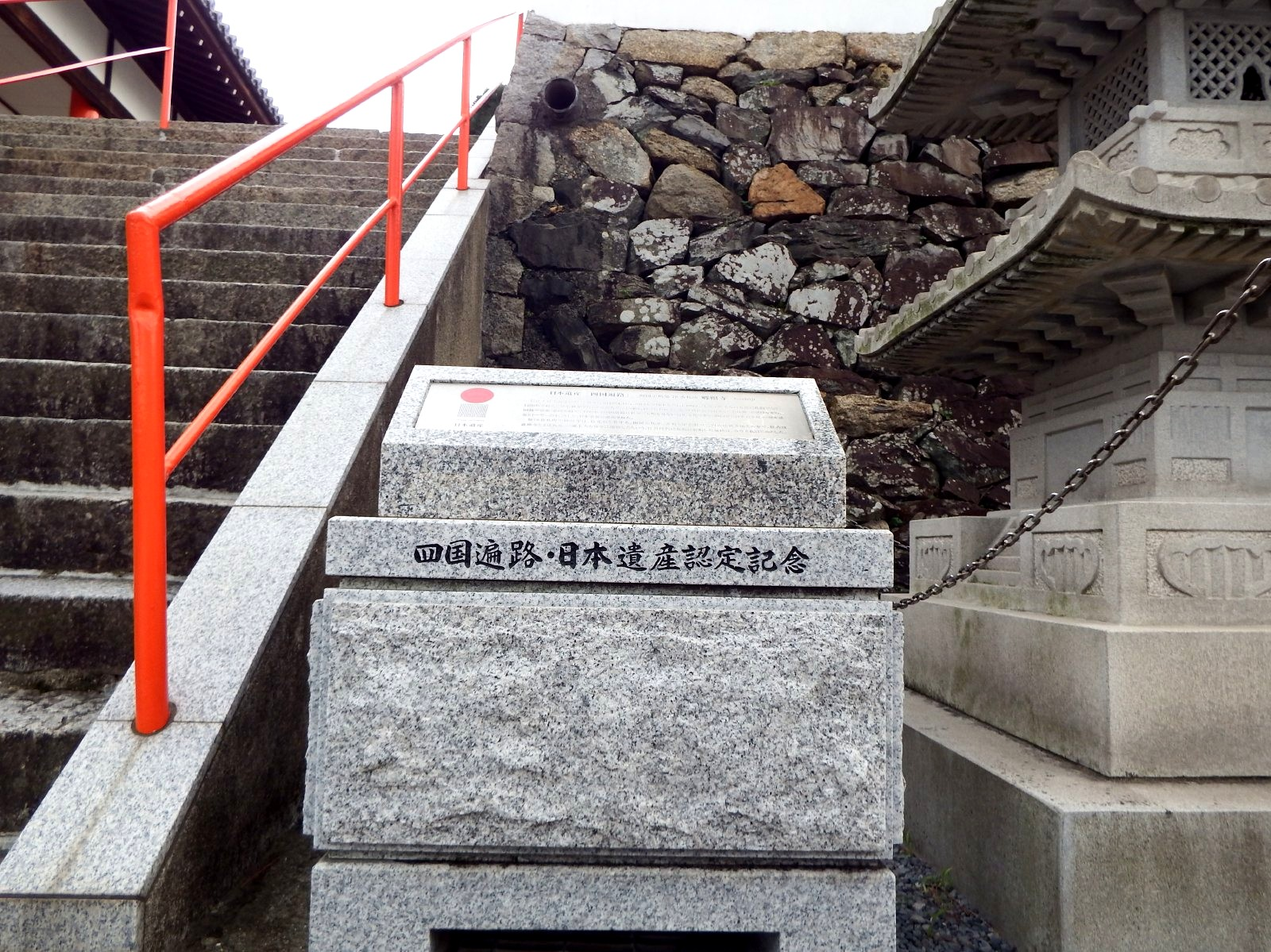 郷照寺の日本遺産の石碑